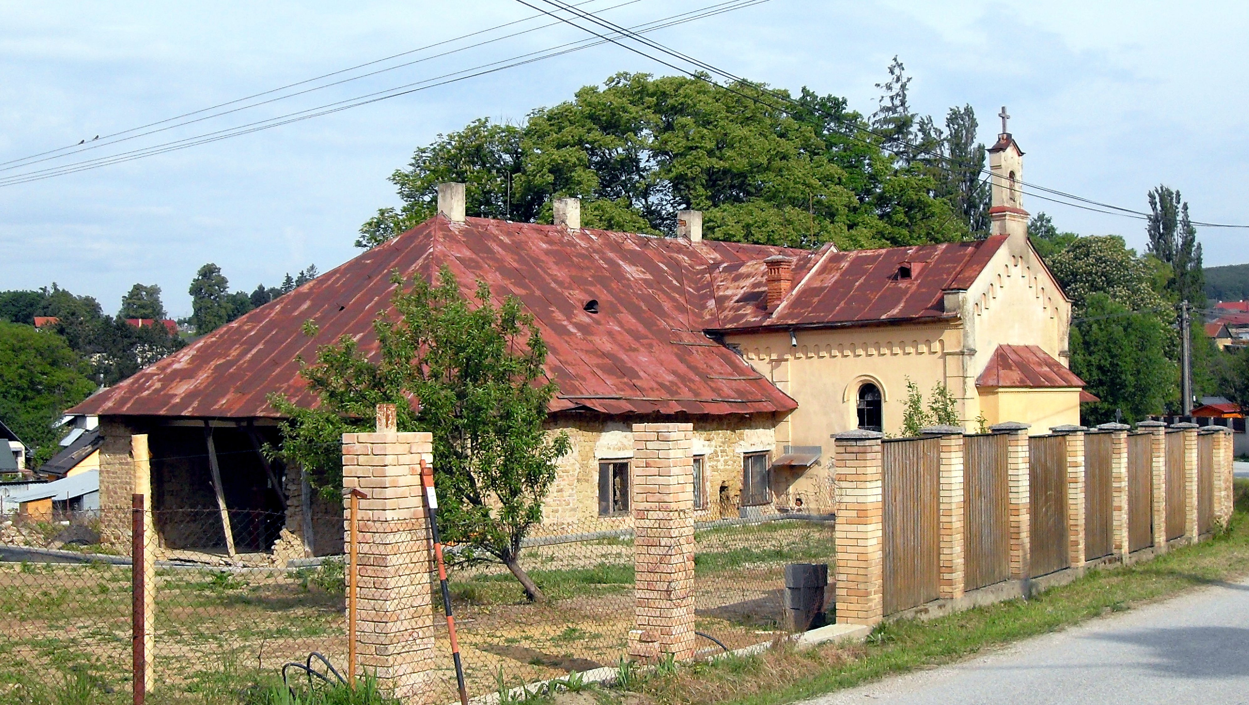 Kaštieľ rodiny Semsey v Šemši s hradná kaplnka